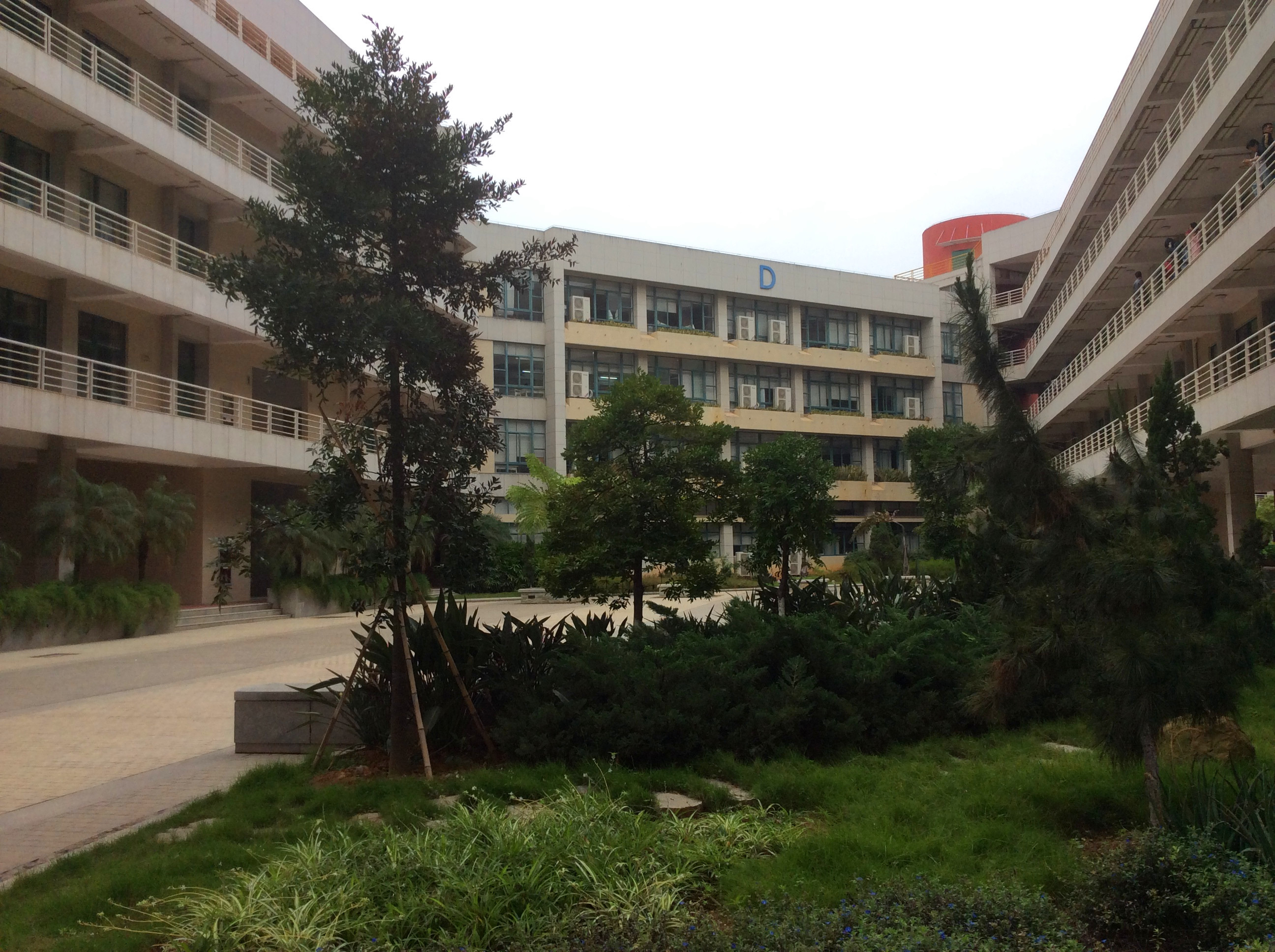 中文（中国大陆）: 华侨大学厦门校区教学楼